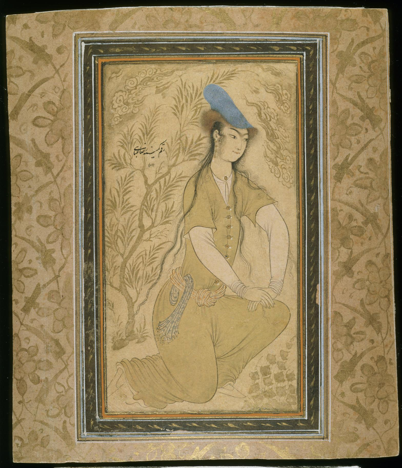 Girl by Reza Abbasi